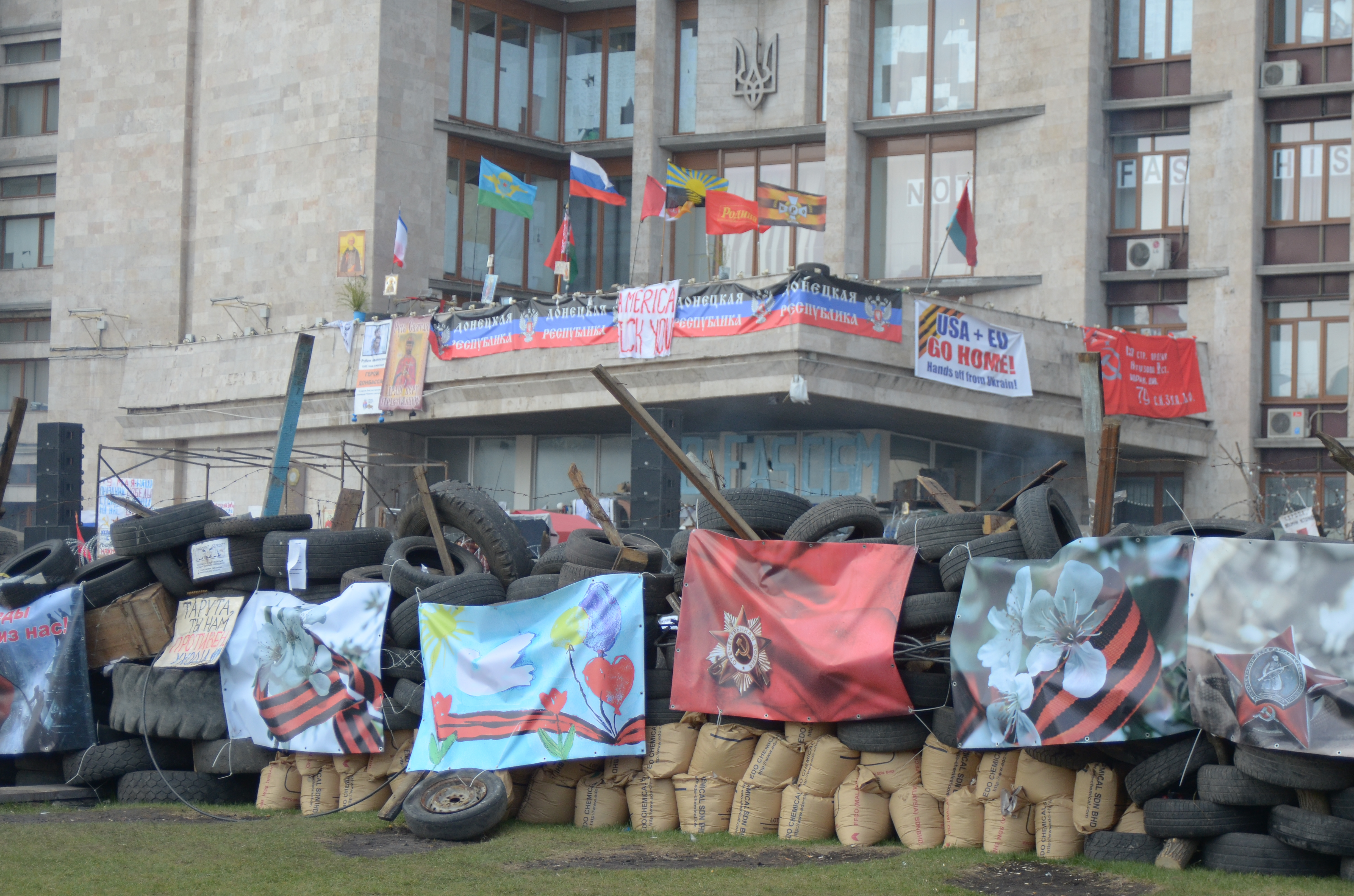 Протесты в Донецке